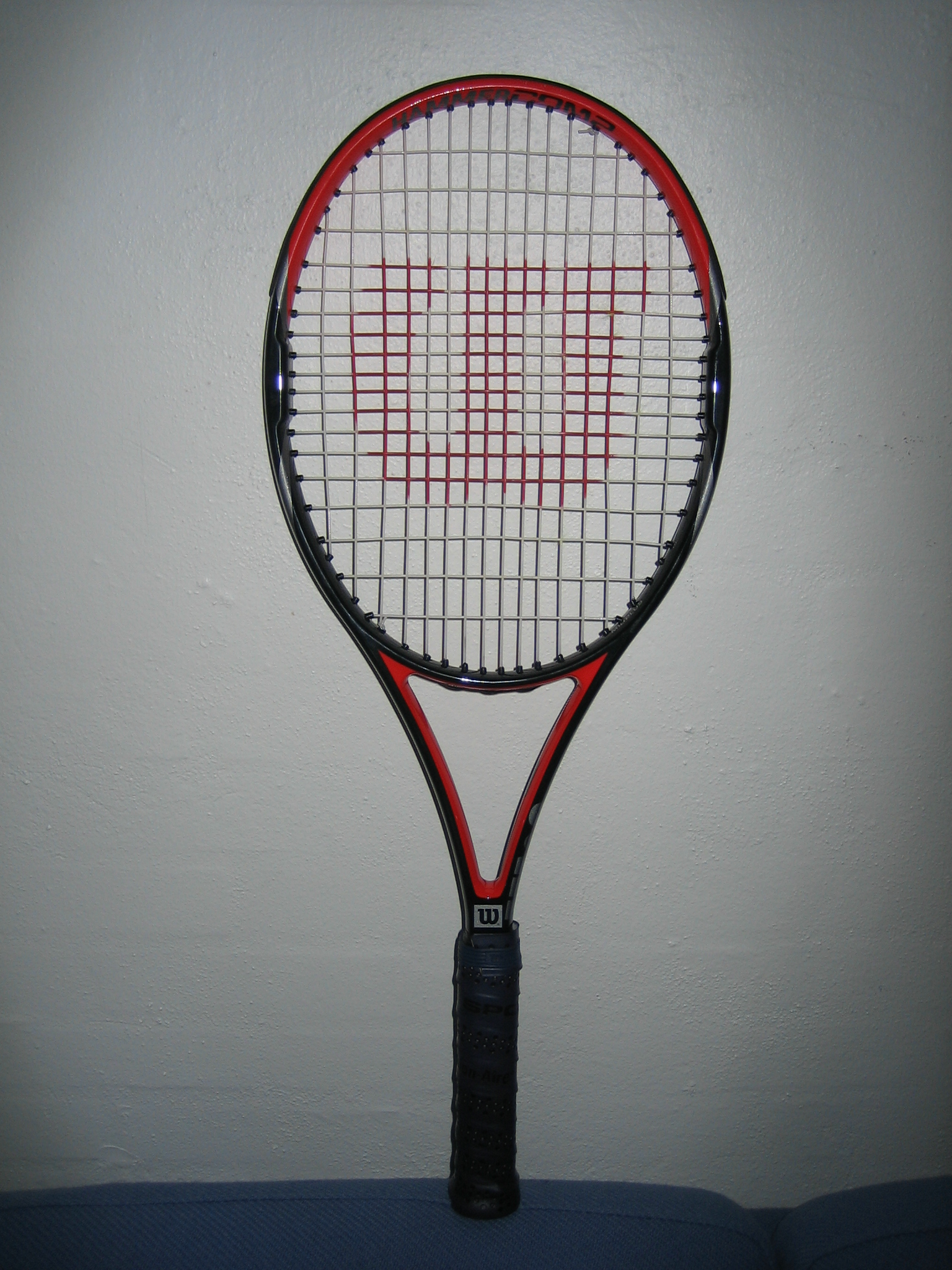 Tennisketsjer